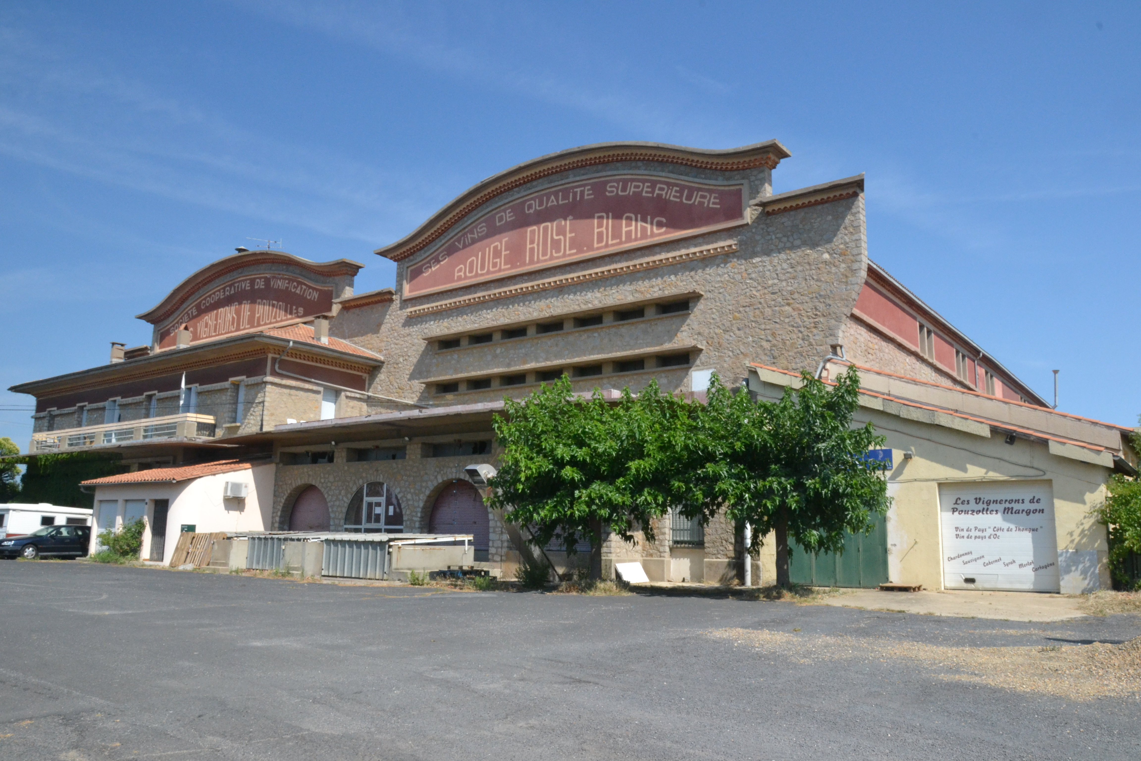 L'une des Cave coopérative des Côtes de Thongue, à Pouzolles